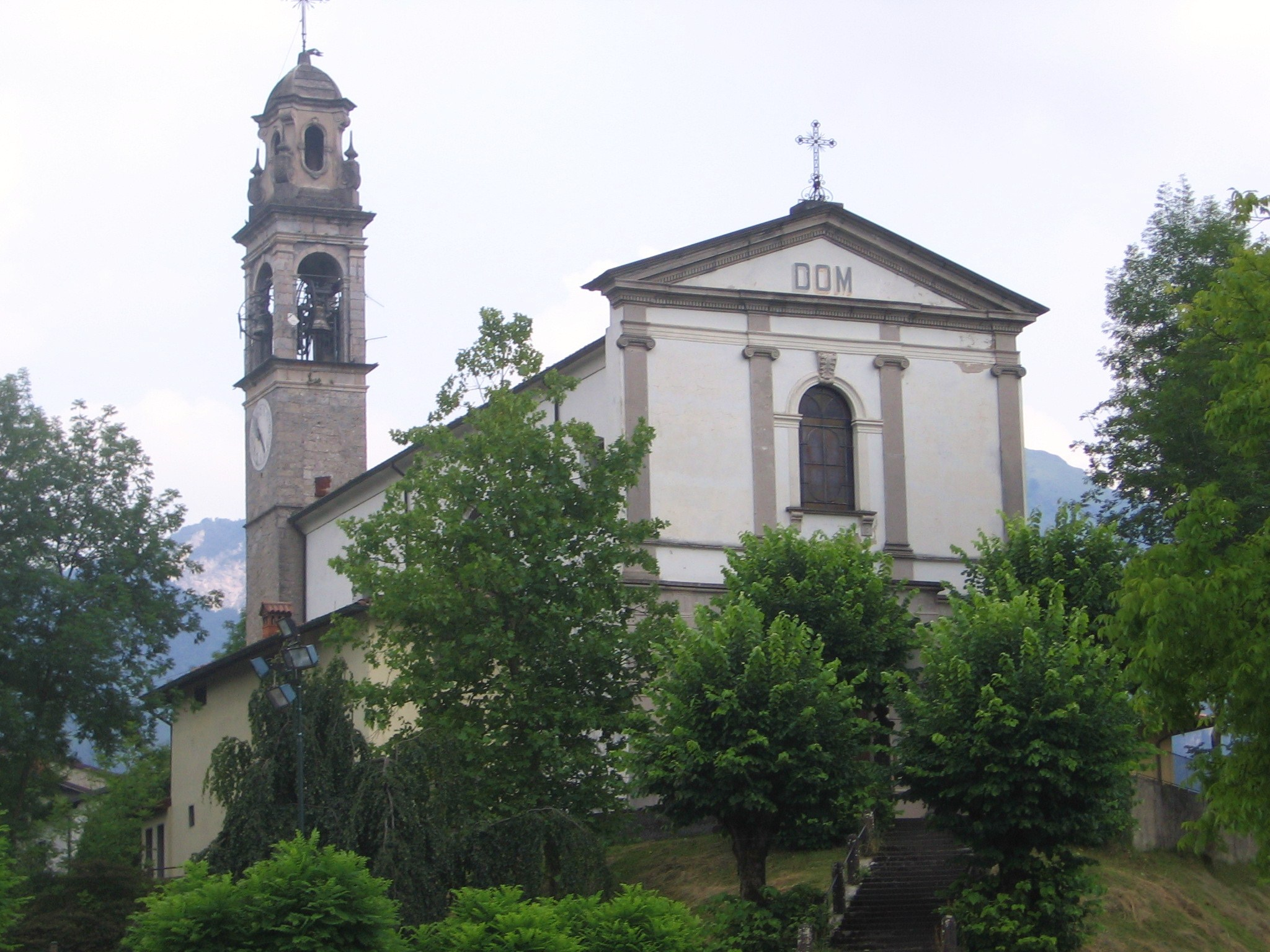 Fino del monte, Bergamo, Italy